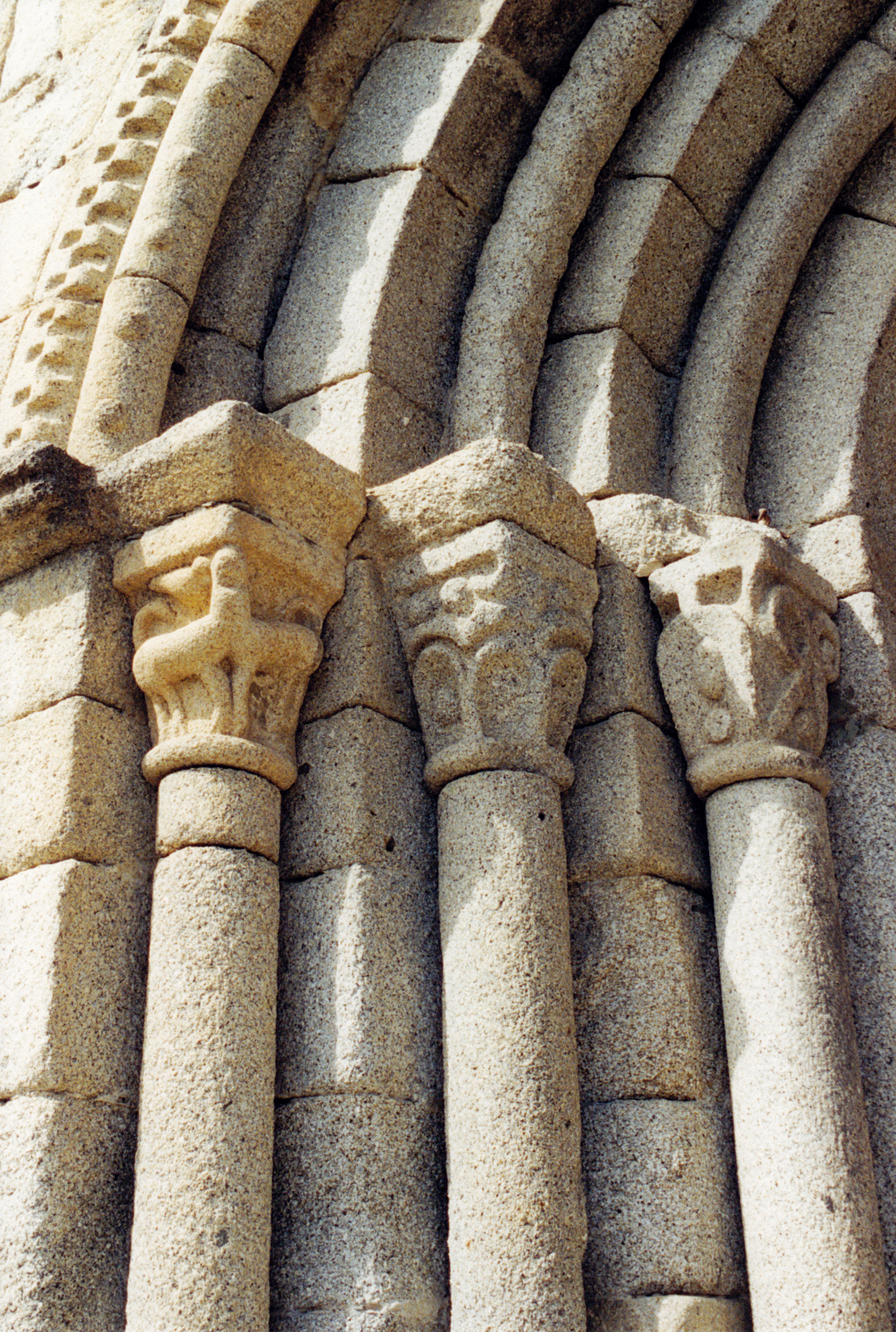 Espagne - Basse-Cerdagne - Église Saint-Estève de Guils de Cerdanya